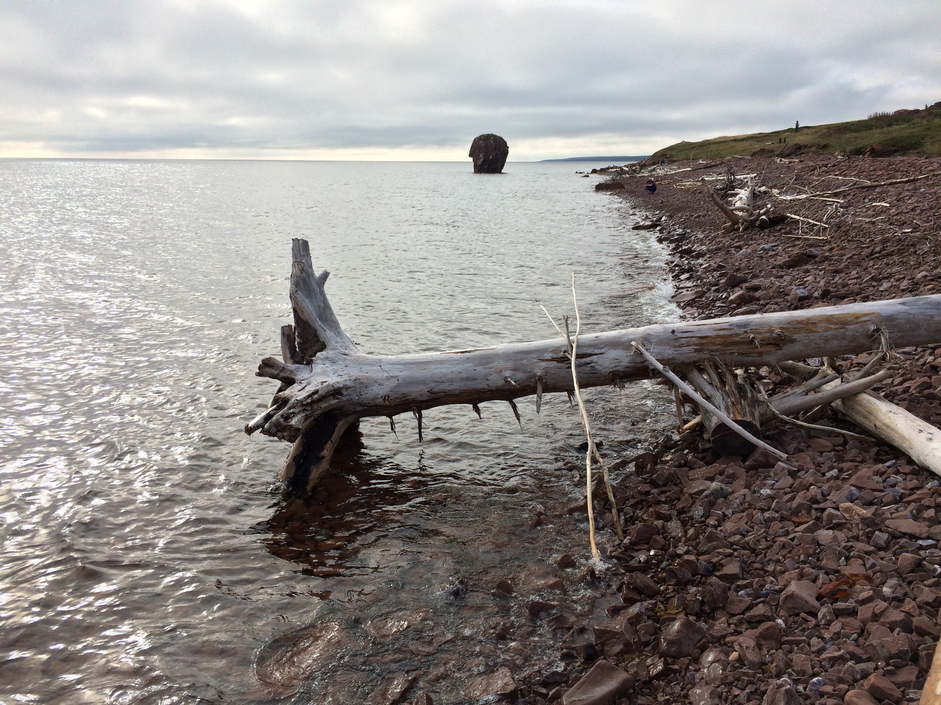 Скала парус на берегу Белого моря